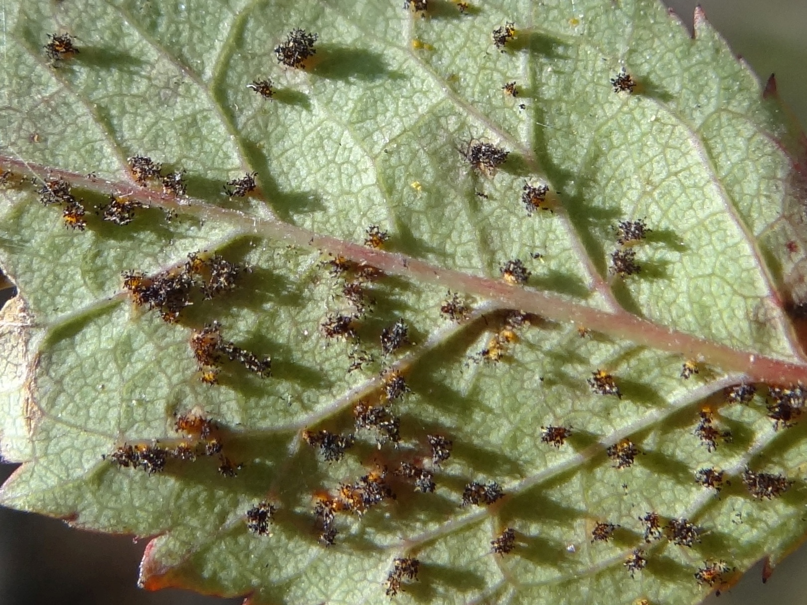 Teliospore Phragmidium mucronatum on Rosa canina. Location: Poland, Beskid Wyspowy, Śnieżnica